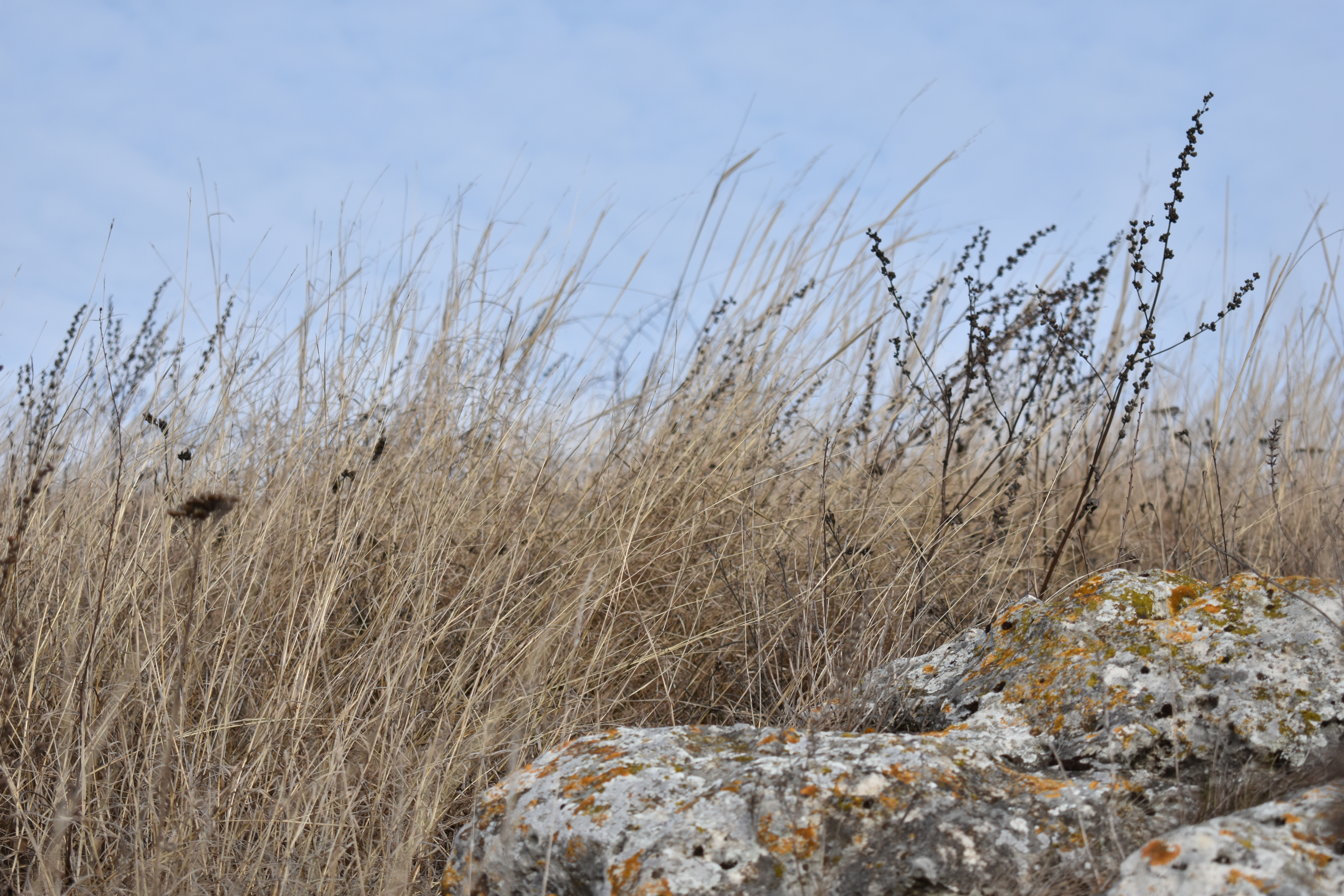 Заказник Григорівська гора. Між селами Криштофівка і Григорівка Могилів-Подільського району Вінницької області